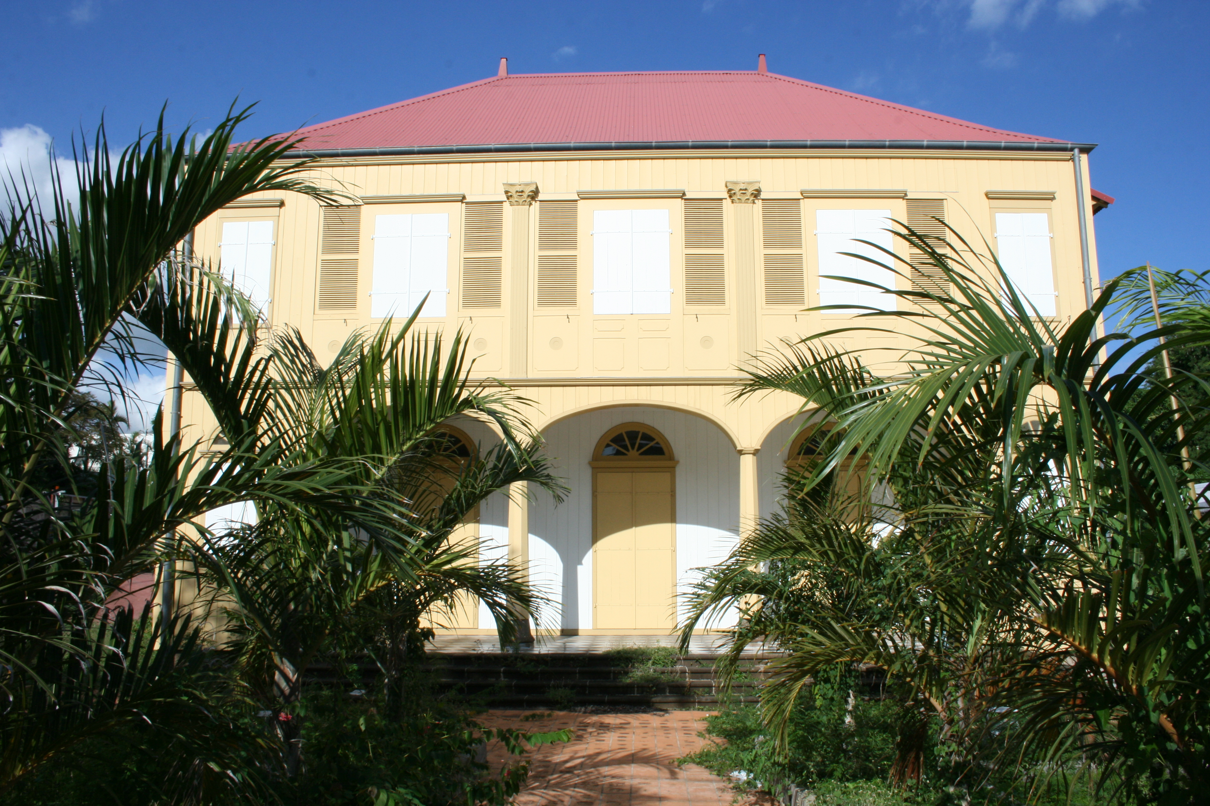 La maison Loupy, à Saint-Pierre de La Réunion.